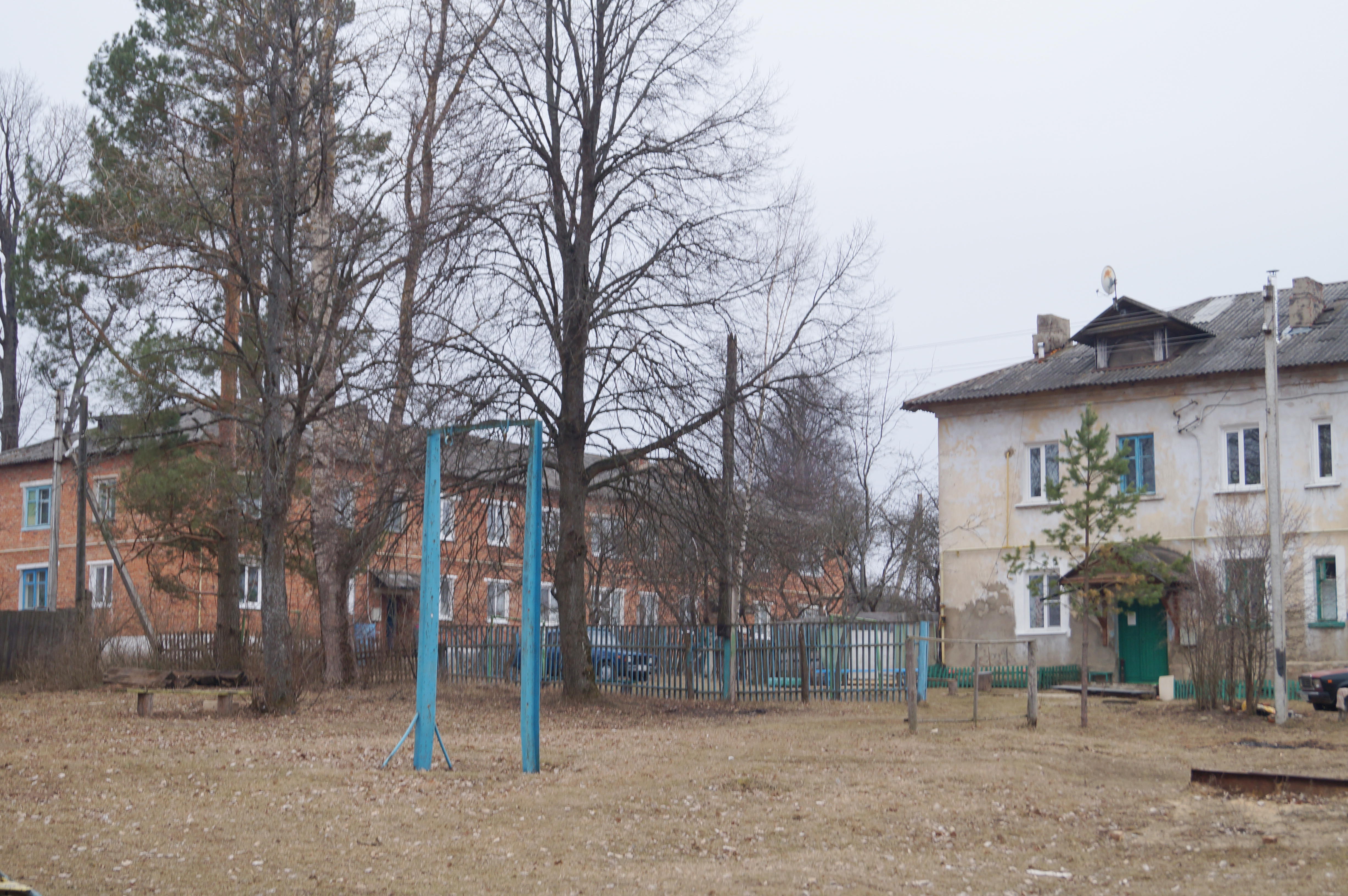 Пос. Дубровская Сельхозтехника